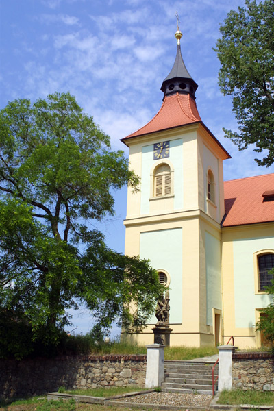 Kostel sv. Mikuláše v Merklíně.